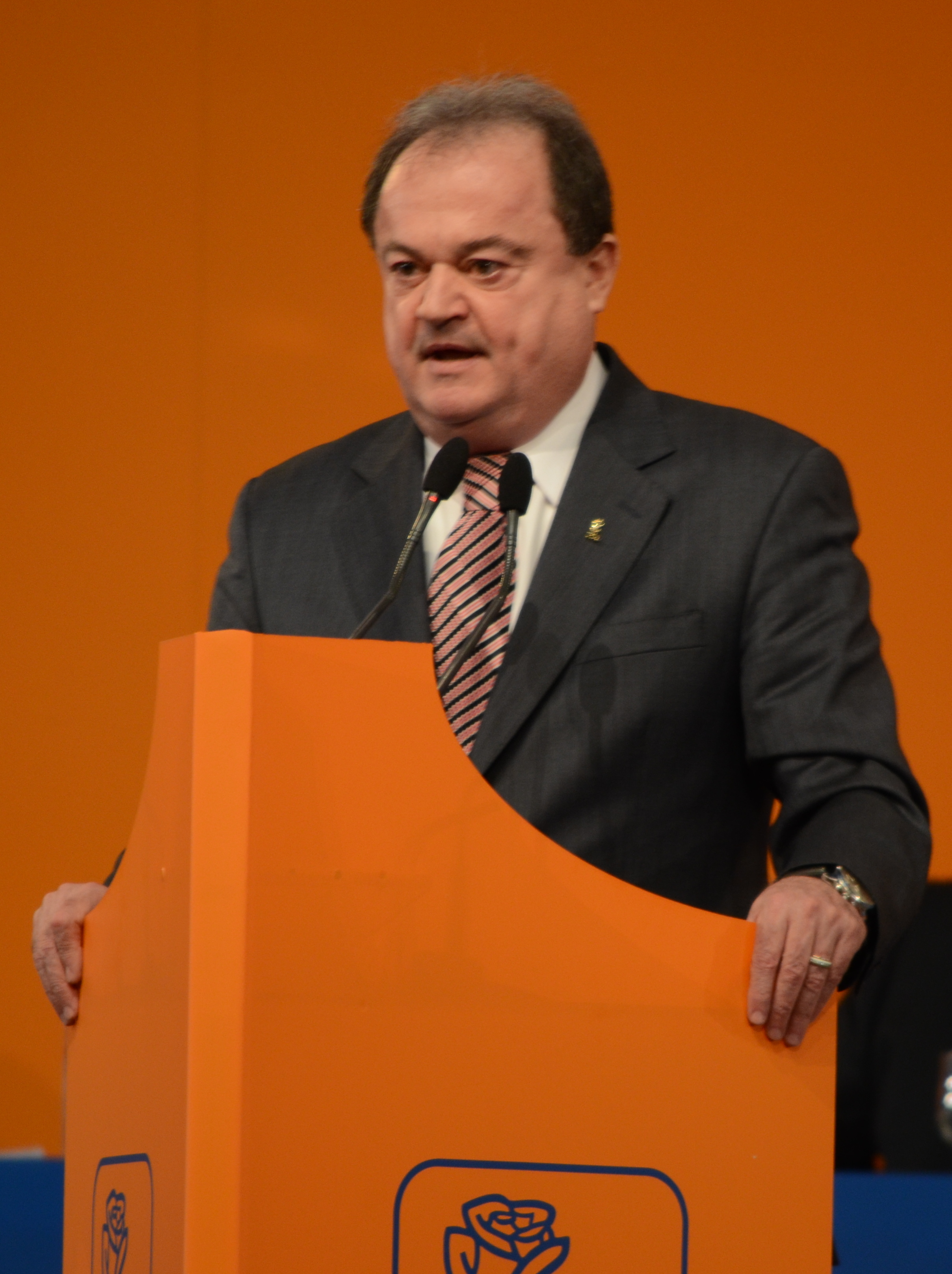 Vasile Blaga (la Convenția națională extraordinară a Partidului Democrat-Liberal, 23 martie 2013)